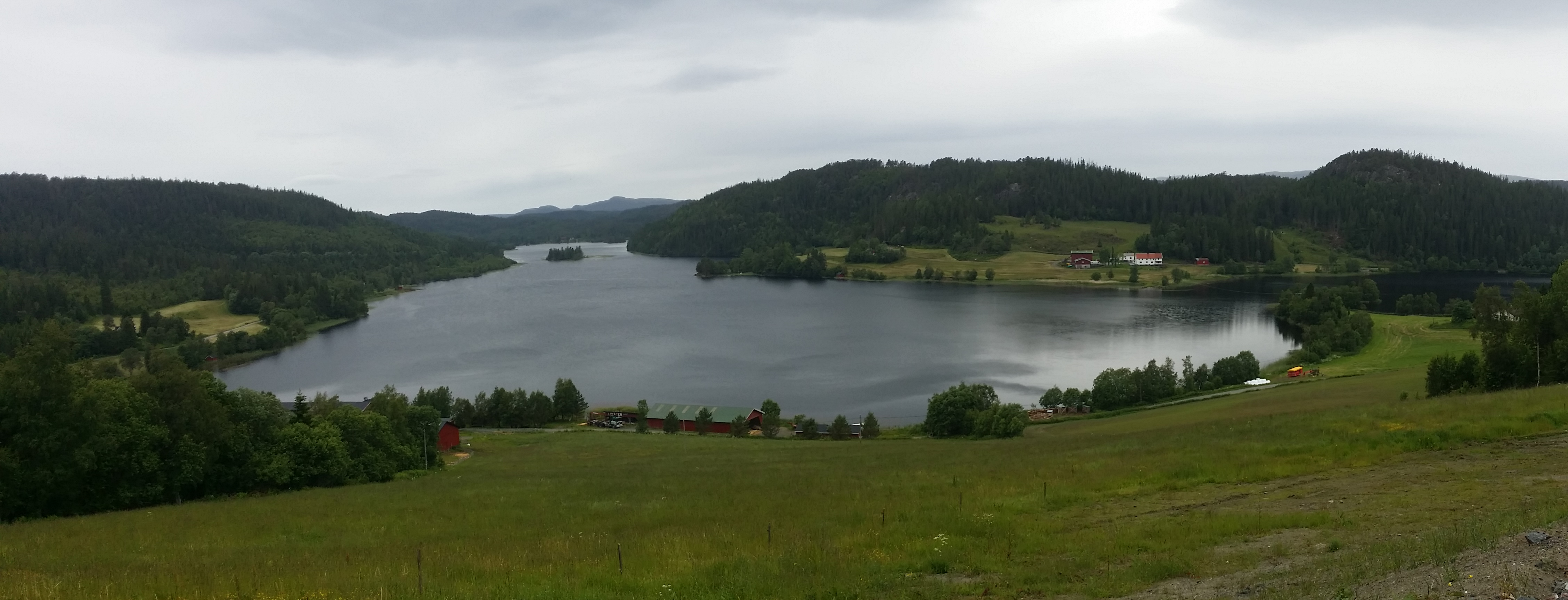 Fjølvikbotnen, a part of Storvatnet lake in Leksvik, Norway